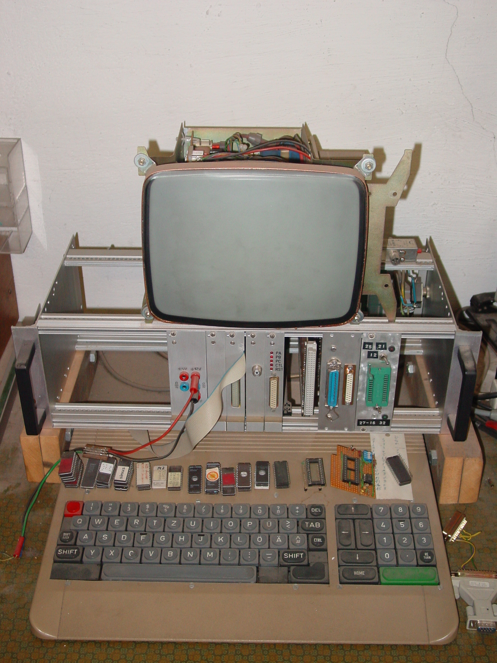 funktionstüchtig aufgebauter MOPPEL mit: Netzteil, RAM-Karte, CPU mit BASIC, Video Aufbereitung, Serielle Karte, BUS-Verlängerung, Parallel-Karte, EPROM Programmer.